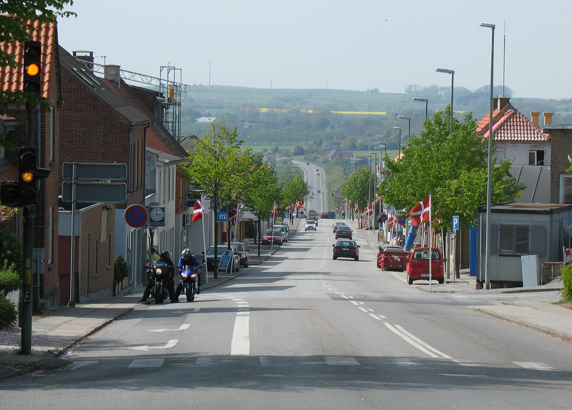 Rønde Hovedgade